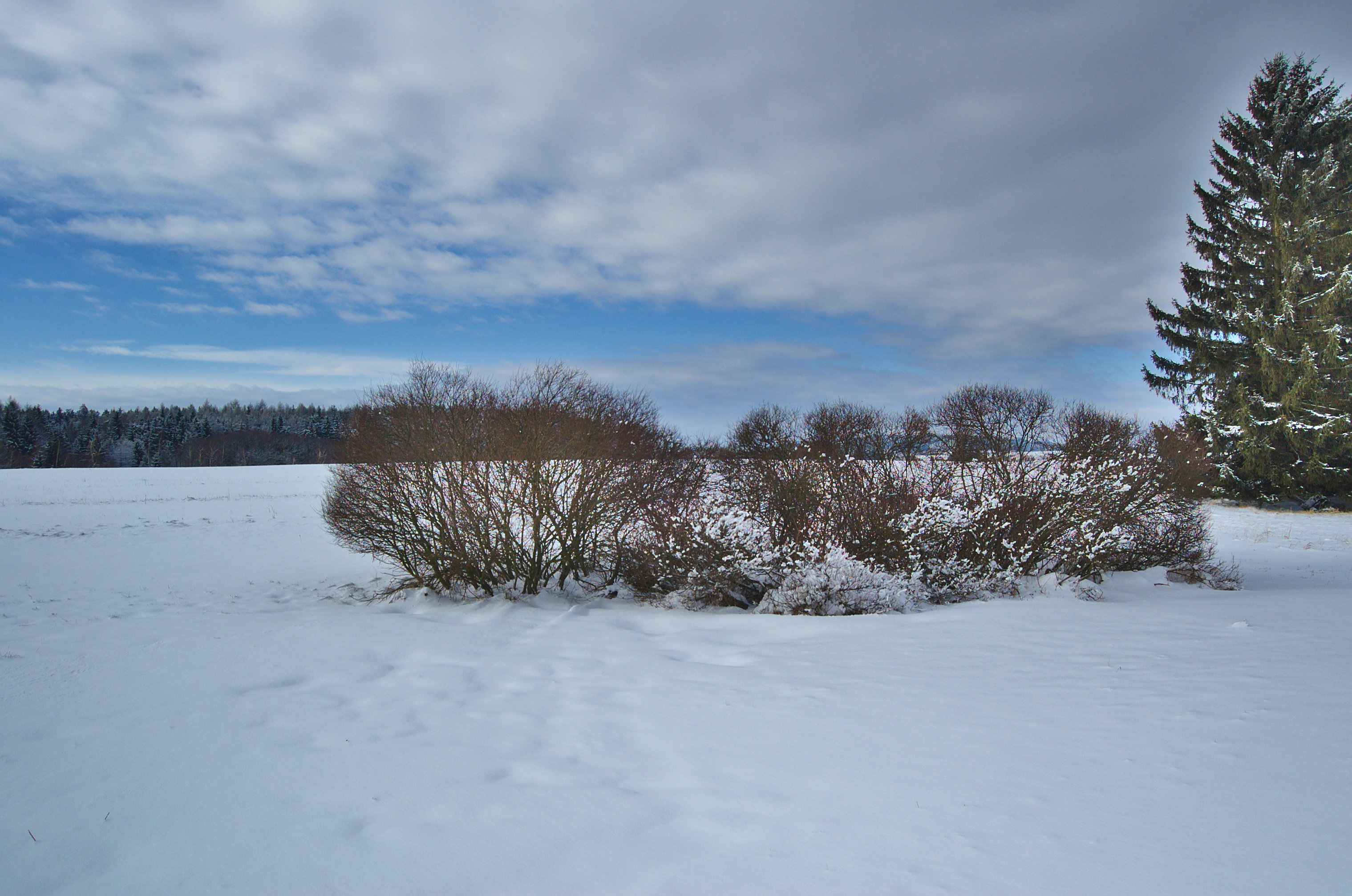 Přírodní rezervace Uhliska, okres Prostějov